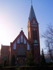 Zdjęcie Koscioła NSPJ w Lubsku